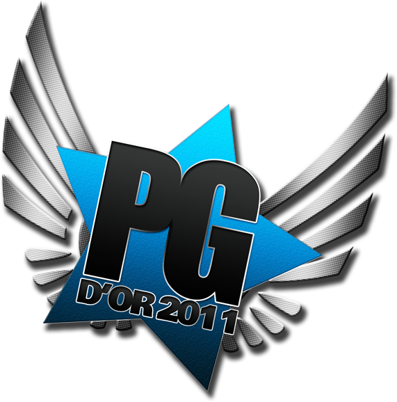 Logo des PG D'OR